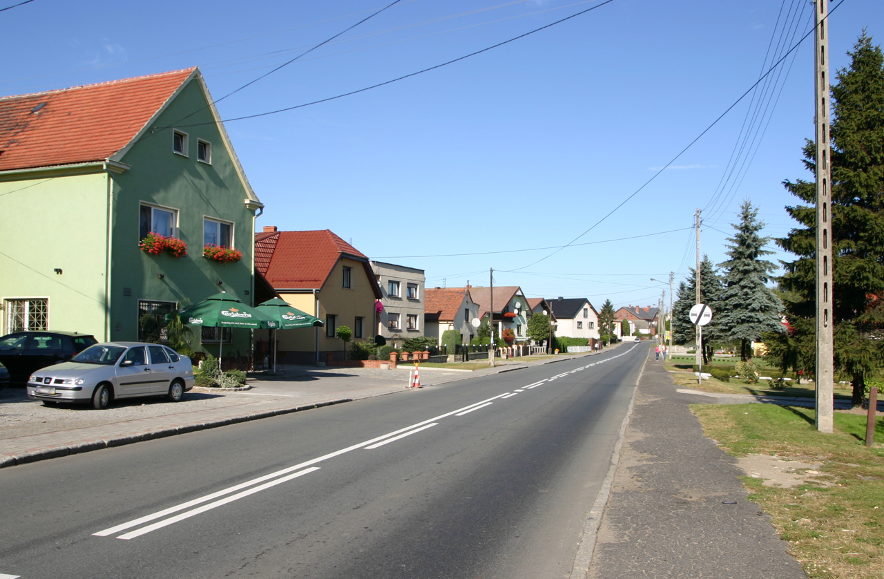 Biedrzychowice – wieś w Polsce położona w województwie opolskim, w powiecie prudnickim, w gminie Głogówek.